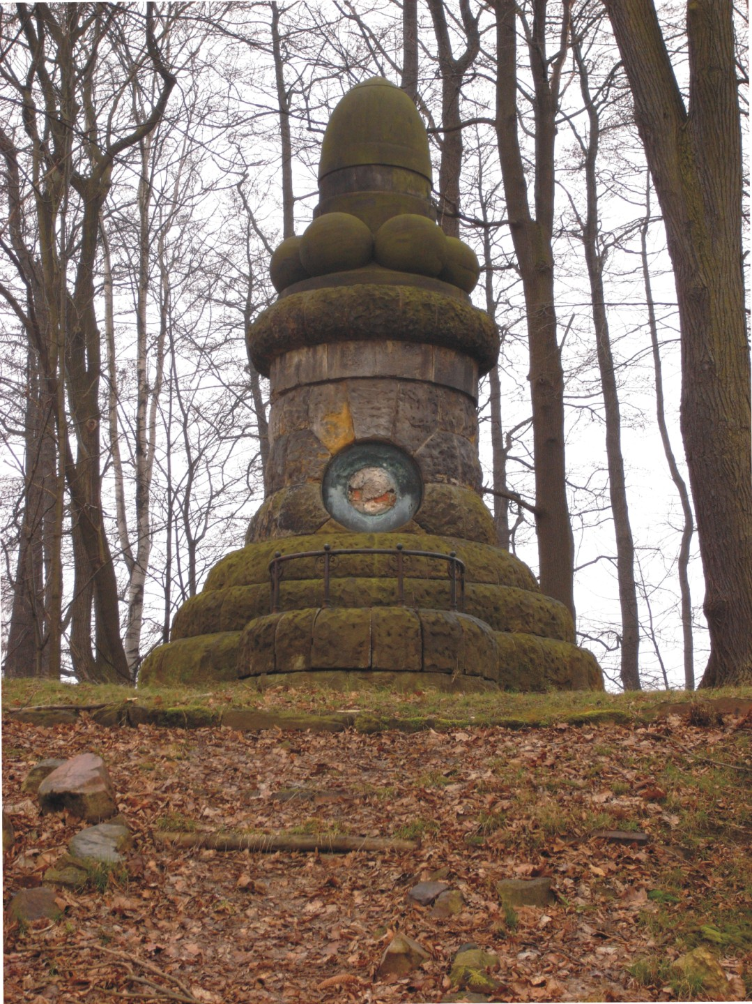 Denkmal für die Kriegsgefallenen in Reinholdshain/Dippoldiswalde (Sachsen, Deutschland)